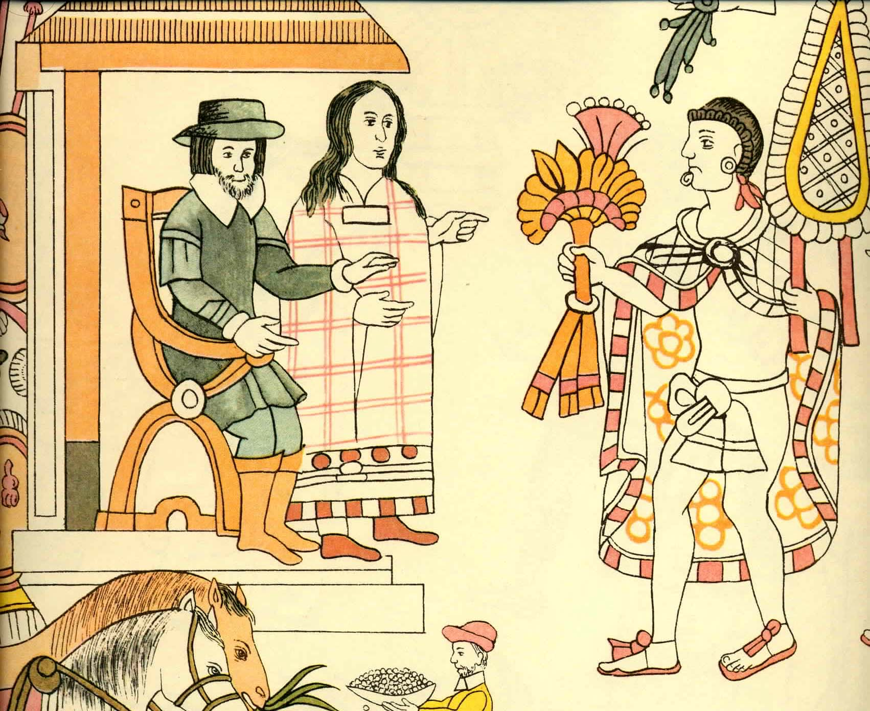 Lámina del Lienzo de Tlaxcala donde se demuestra qué hizo Hernán Cortés.